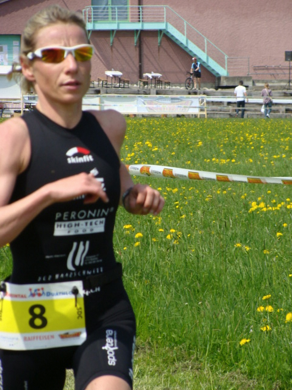 Jacqueline Uebelhart, beim Rheintal Duathlon 2010